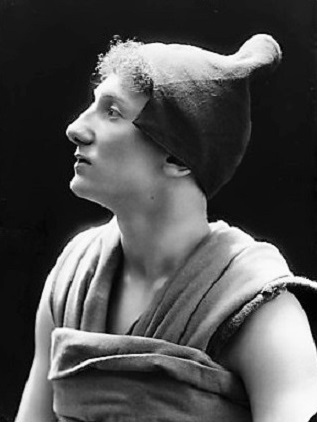 Gabriellino D'Annunzio